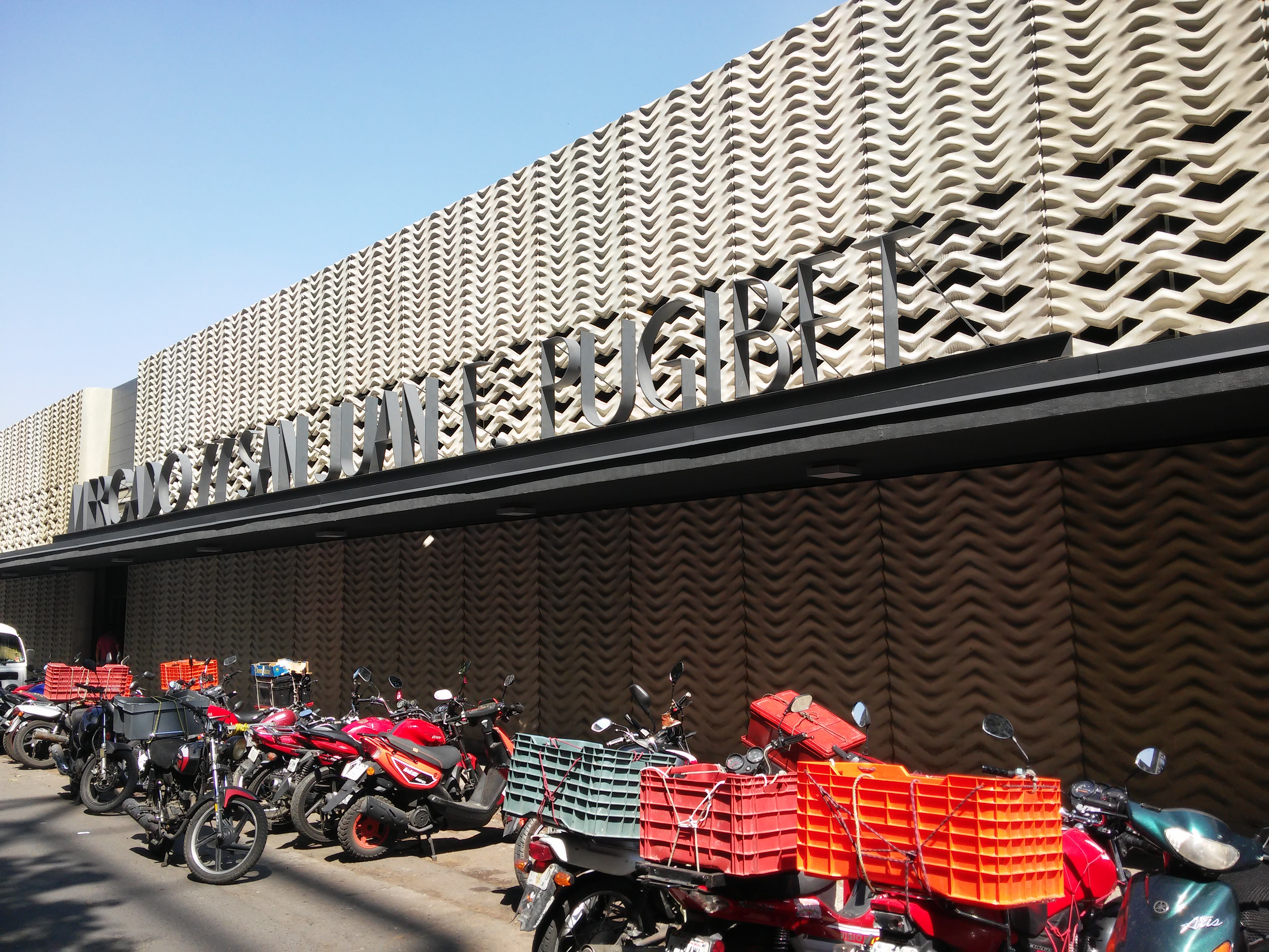 Mercado de San Juan Ernesto Pugibet en el Centro histórico de la Ciudad de México